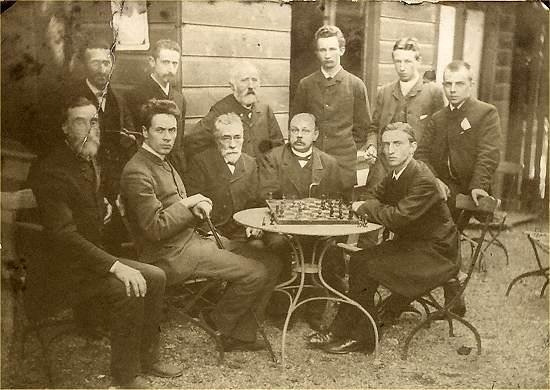 Boven een foto van het NK 1887. Het kampioenschap dat Dirk van Foreest aldus voor de derde keer op rij kampioen werd. Rechts, zittend aan de tafel achter de zwarte stukken, zien we Dirk van Foreest. Rechtsachter hem Arnold van Foreest, links daarnaast: Olland. De volledige lijst van aanwezigen: (staand van links naar rechts) Benima, Süsholtz, Veraart, Tresling, Olland, Arnold van Foreest; (zittend van links naar rechts) Pinedo, Loman, Tinholt, Rothe, Dirk van Foreest.